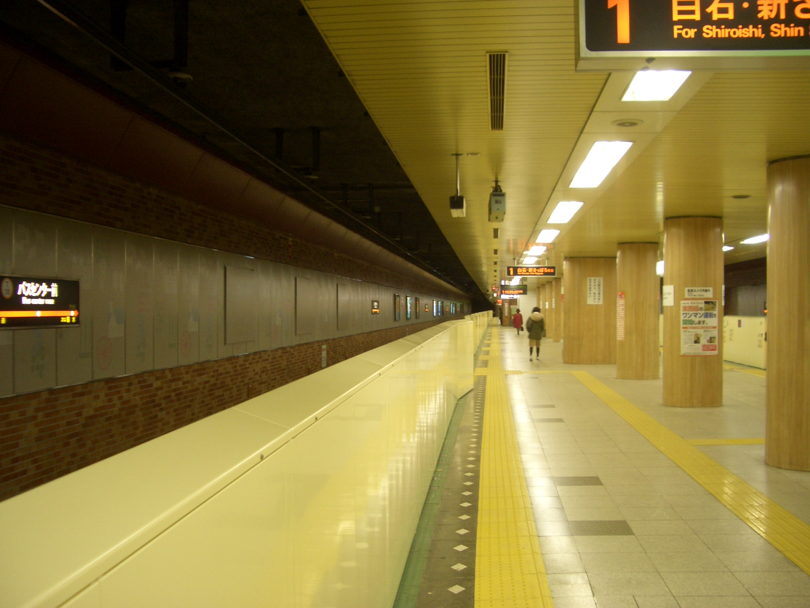 札幌市営地下鉄東西線のバスセンター前